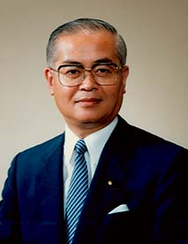 Minister Takao Jinnouchi.